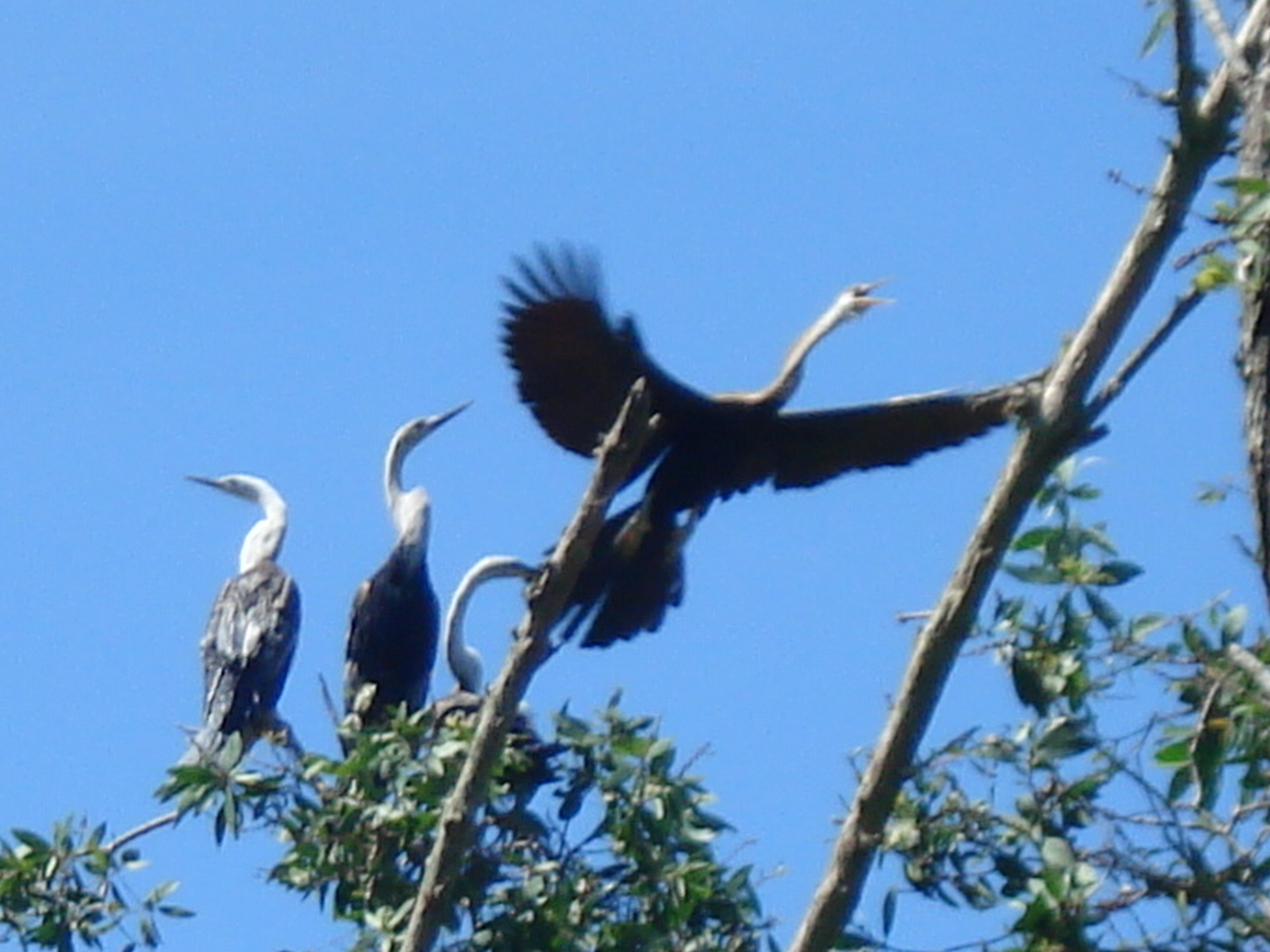 de nombreux oiseaux nichent dans la forêt de cajeputs